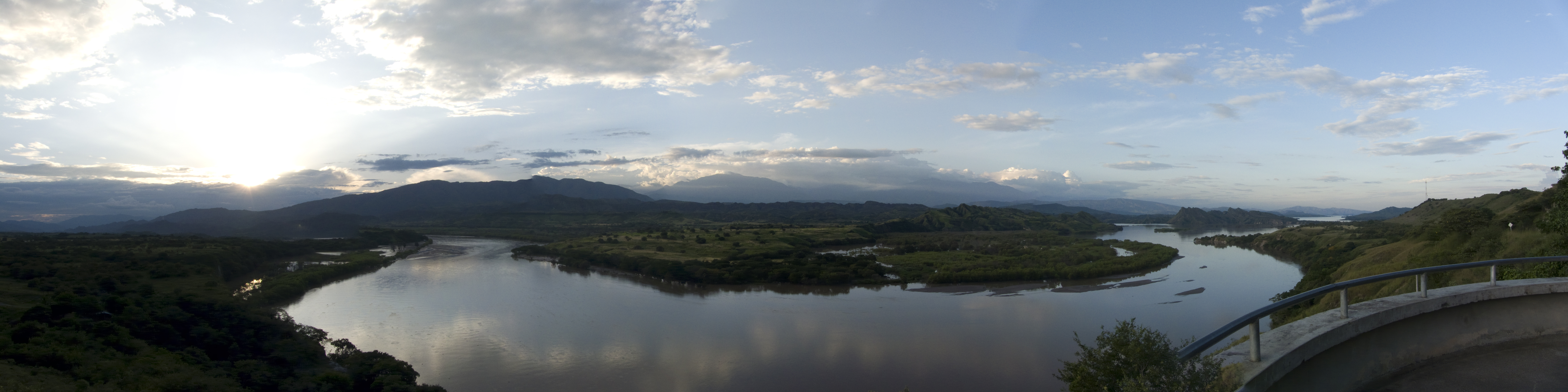 represa de betania (panoramica)